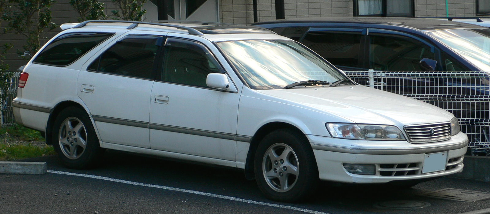 Toyota_Mark_II_Qualis (1997 - 1999)